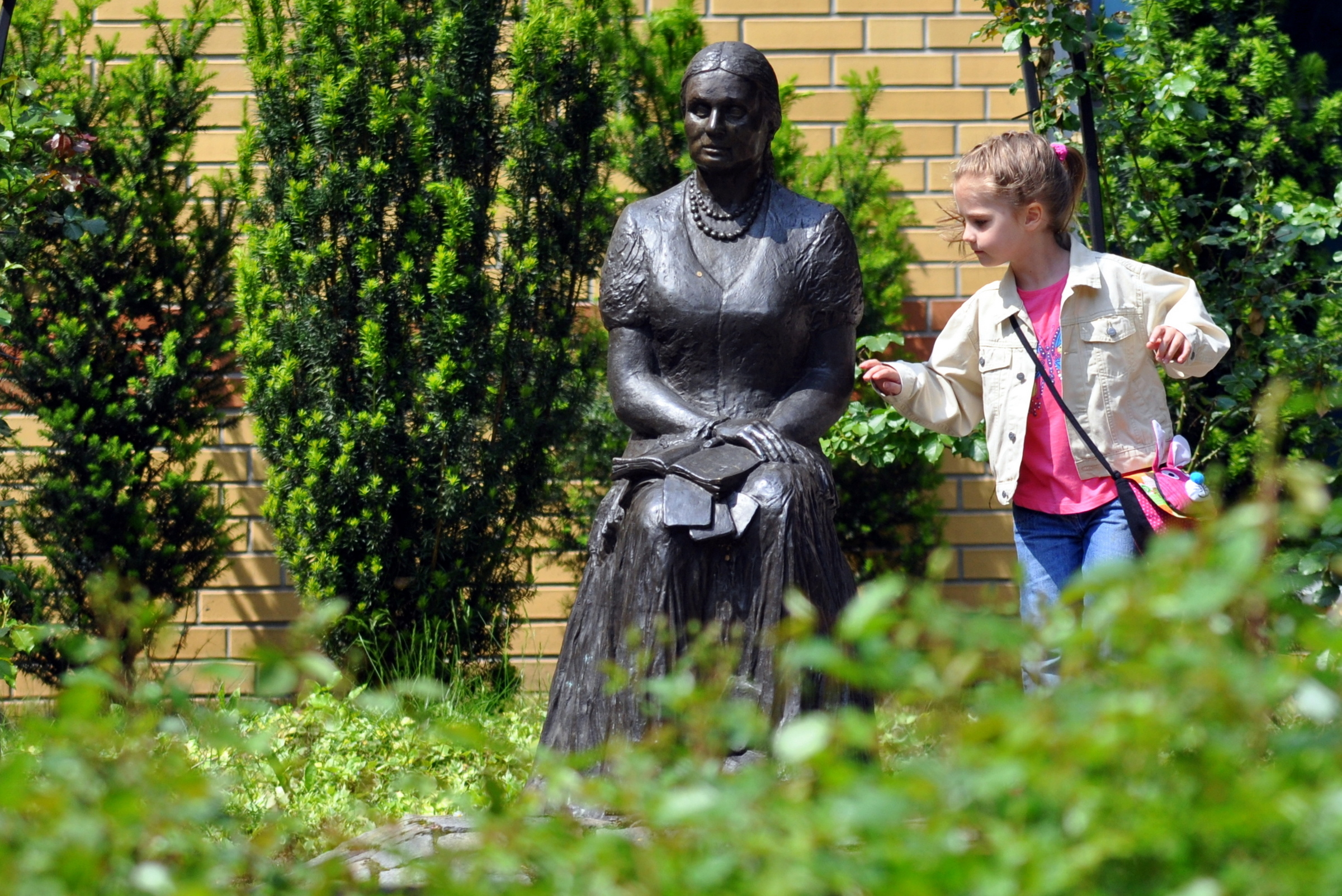 Bronisława Wajs, znana jako Papusza - poetka cygańska. Pomnik autorstwa Zofii Bilińskiej, odsłonięty w 2007 r. w Parku Róż ( właściwie Park Wiosny Ludów ), w którym poetka spędzała wiele czasu.